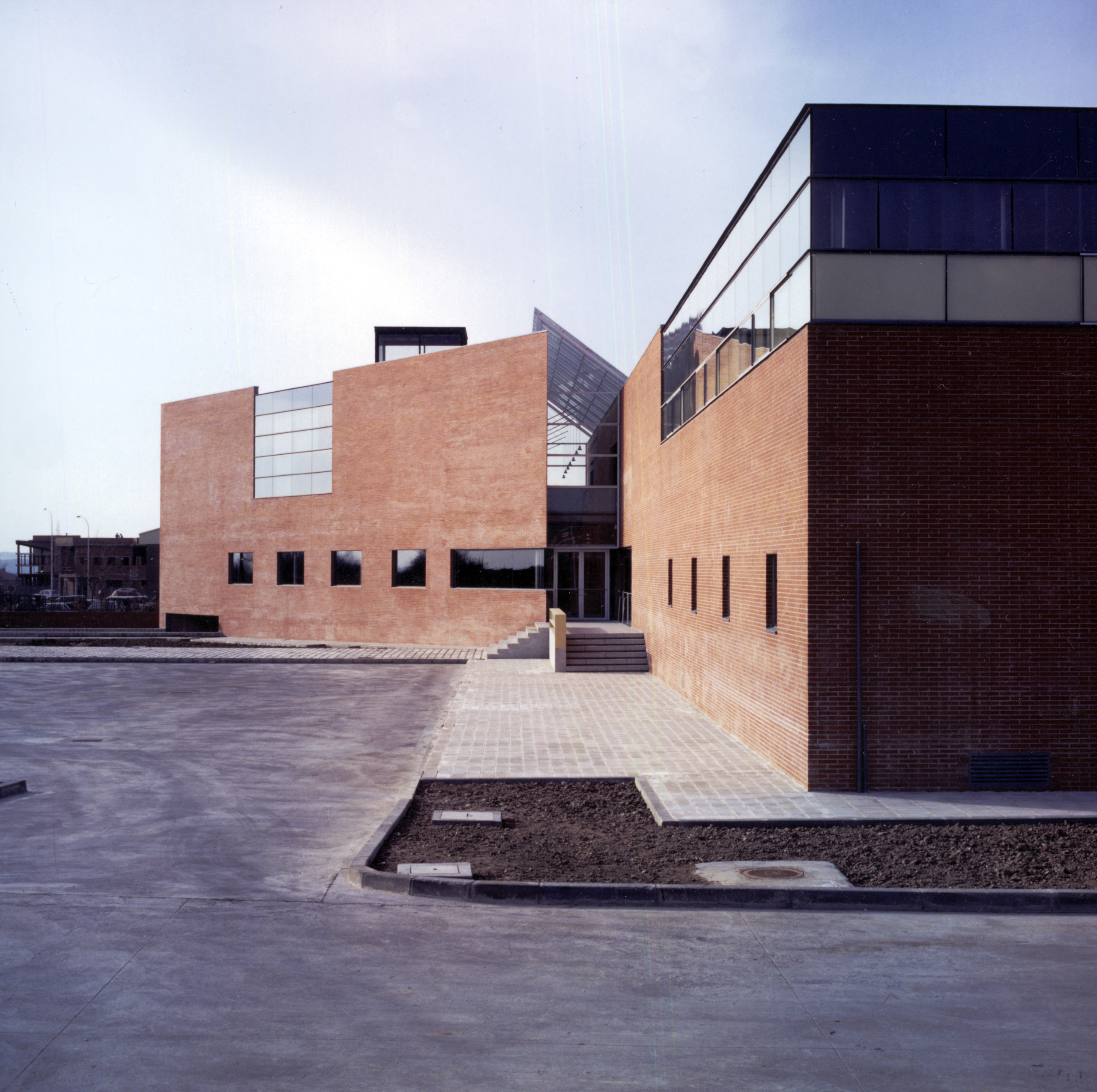 MARIANO BAYÓN Centro de diseño Volumen en Algete